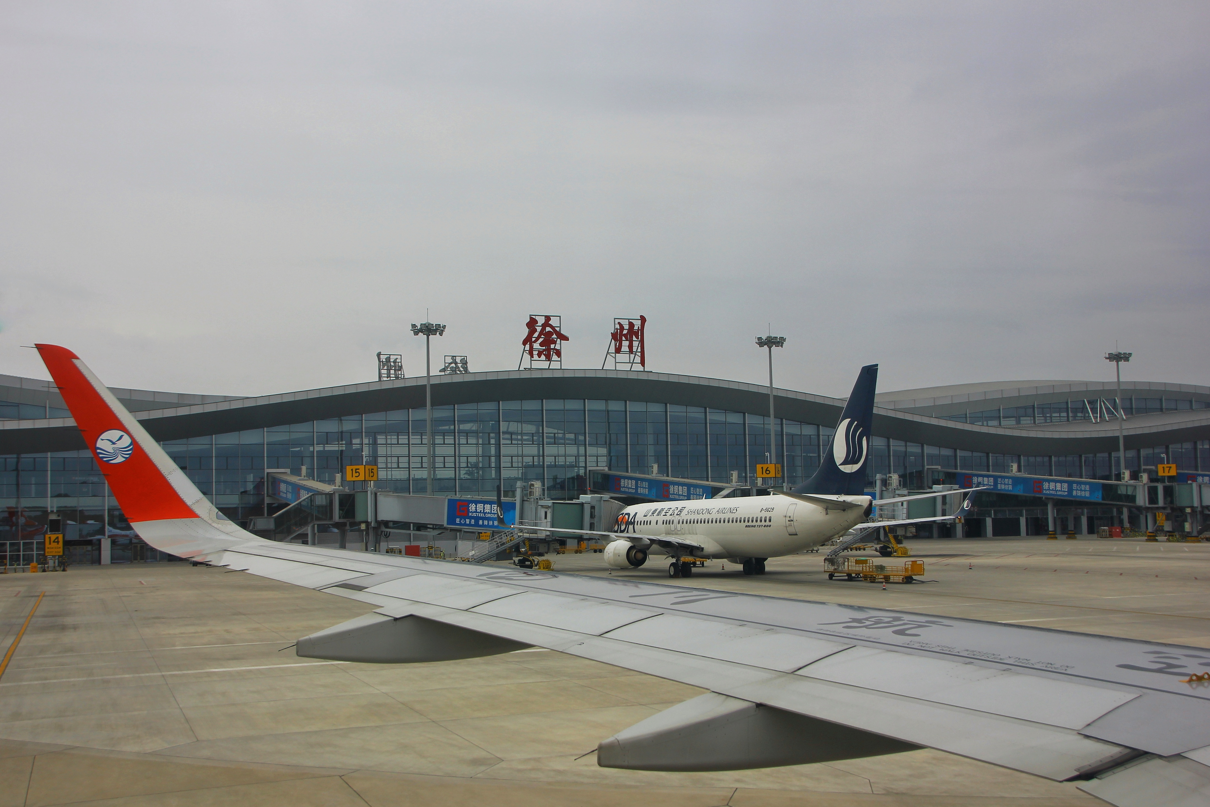 中文（中国大陆）: 徐州观音机场